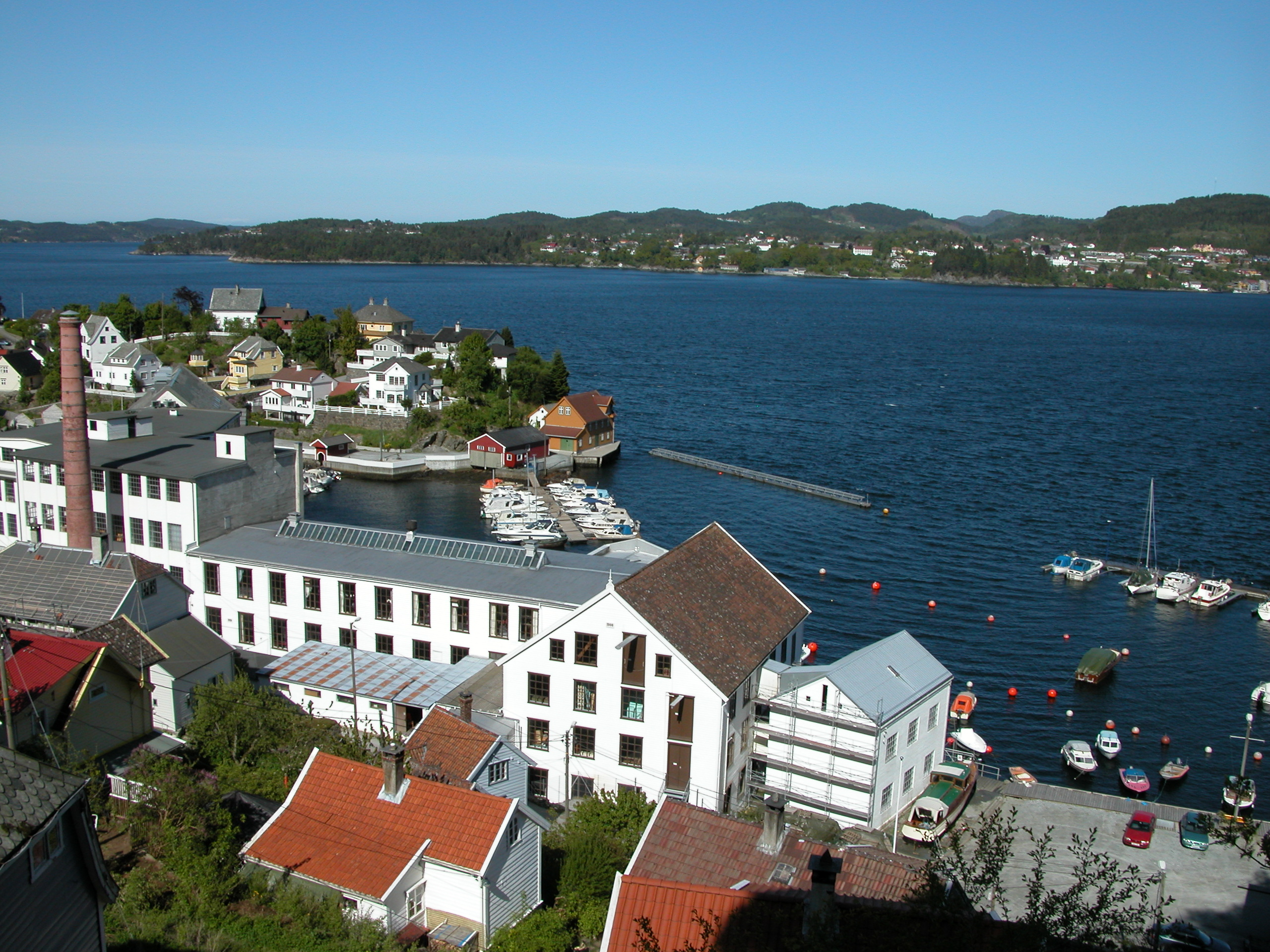 Gamle Salhus Tricotagefabrik